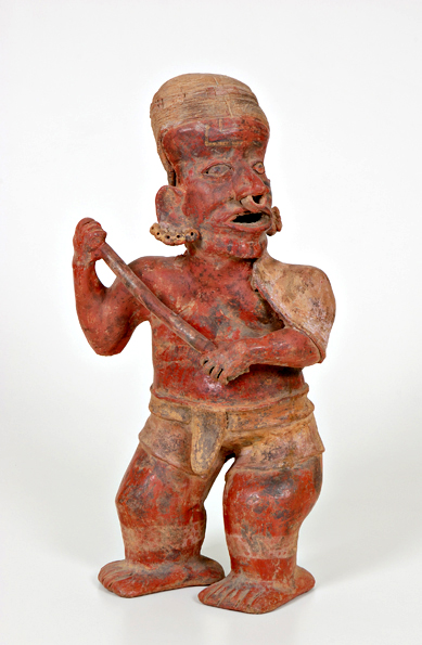 Figura di guerriero con bastone. Messico occidentale, Nayarit meridionale, III secolo a.C.-IV secolo d.C. Periodo inf. di Ixtlan, stile San Sebastian rosso.